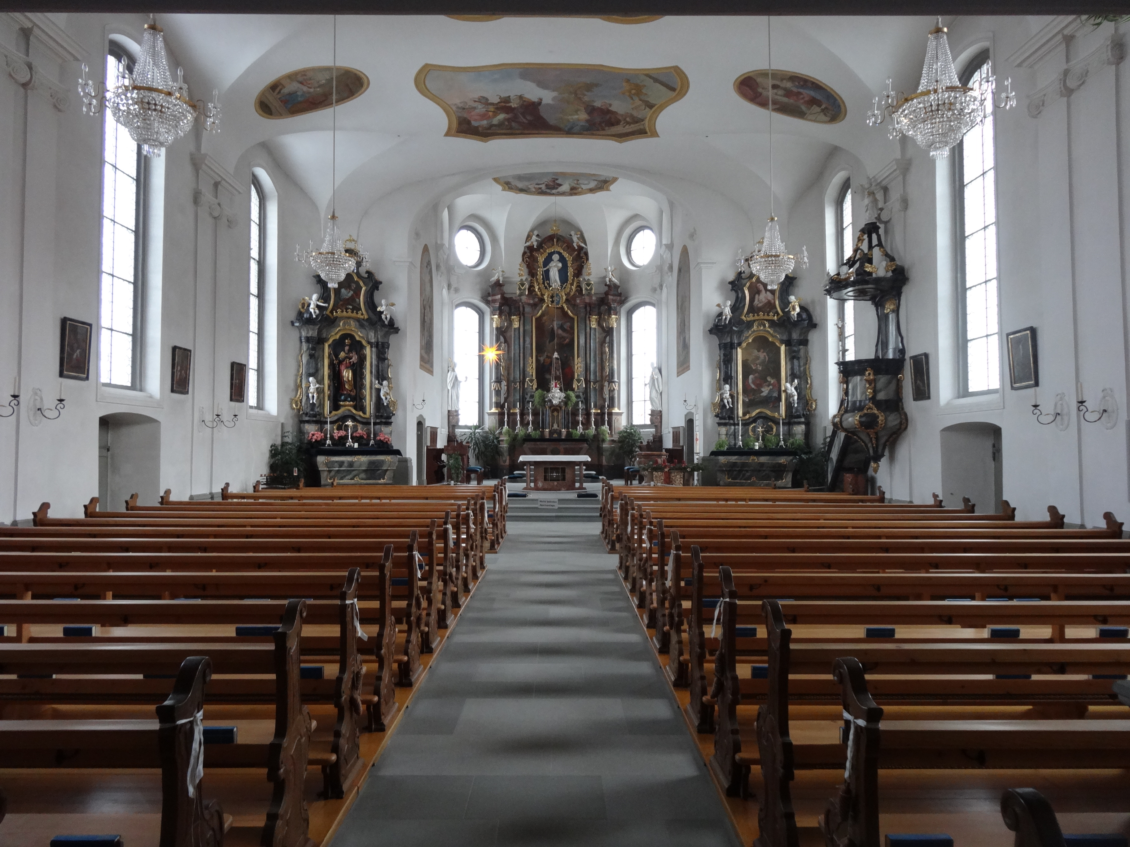 Kath. Pfarrkirche St. Jakobus in Feusisberg (Innenraum)